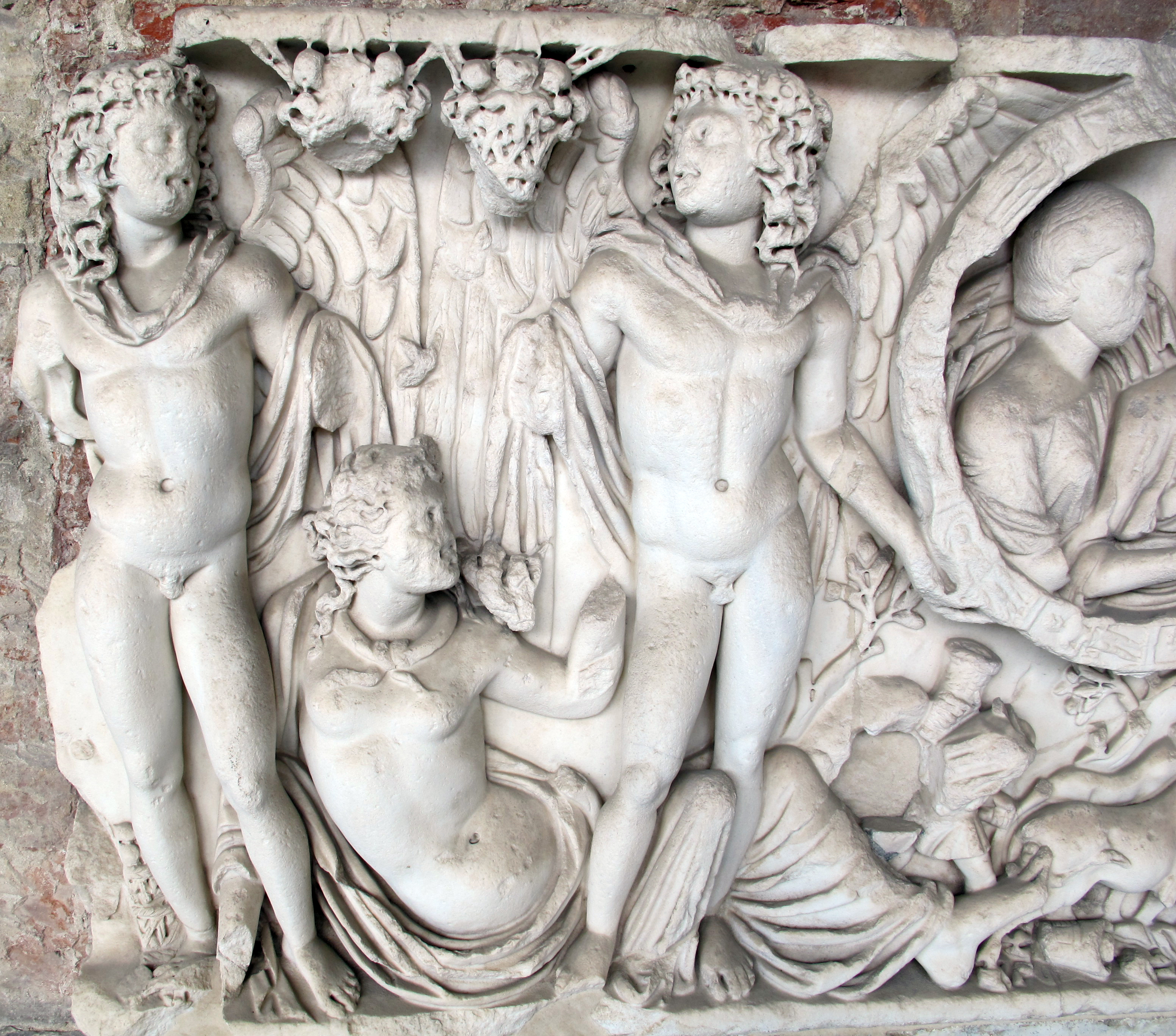 Sarcofago 25, con clipeo defunti e figure mitologiche